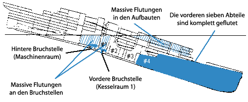 Titanic beim Auseinanderbrechen gegen 2:18 Uhr